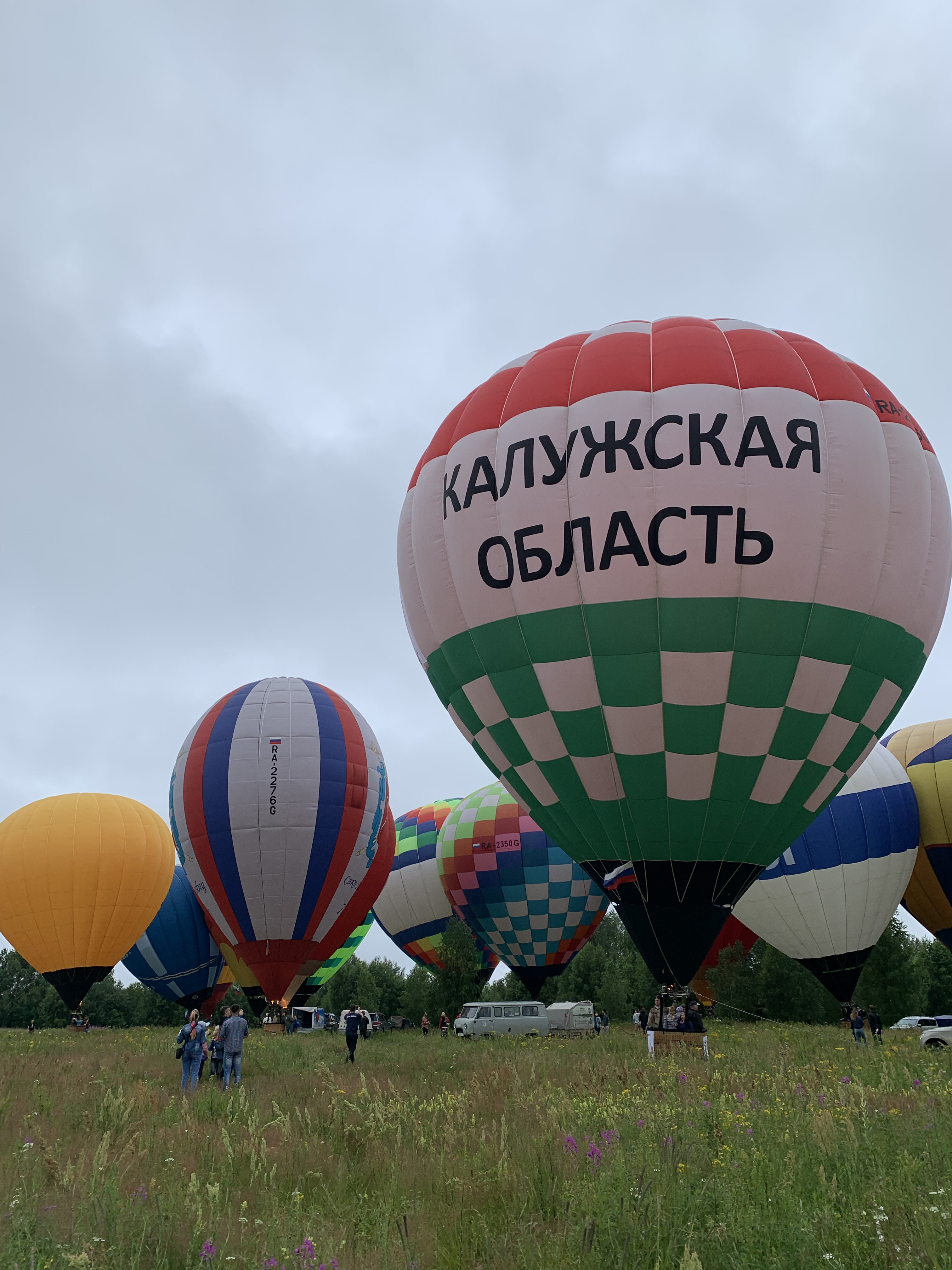 Фестиваль воздушных шаров